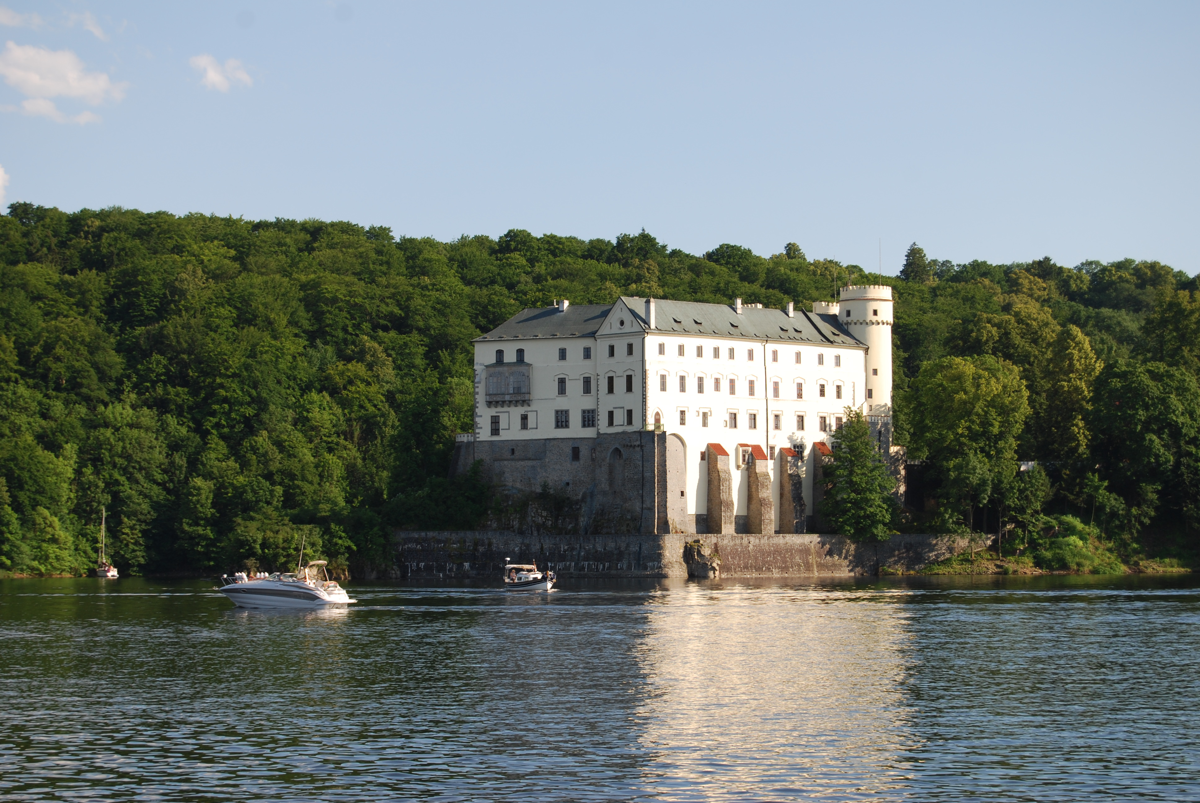 Pohled na vodní nádrž Orlík a zámek Orlík z protějšího břehu nedaleko od kempu Radava. Okres Písek. Česká republika.